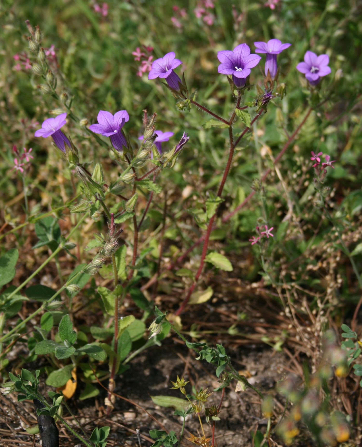 Campanula dichotoma, Glockenblumengewächse (Campanulaceae) - Italien/Italia/Italy: Kalabrien/Calabria, Prov. Reggio Calabria, Aspromonte, bei San Peri, SSE Scilla